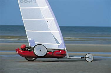 Een zeilwagen type Klasse 5